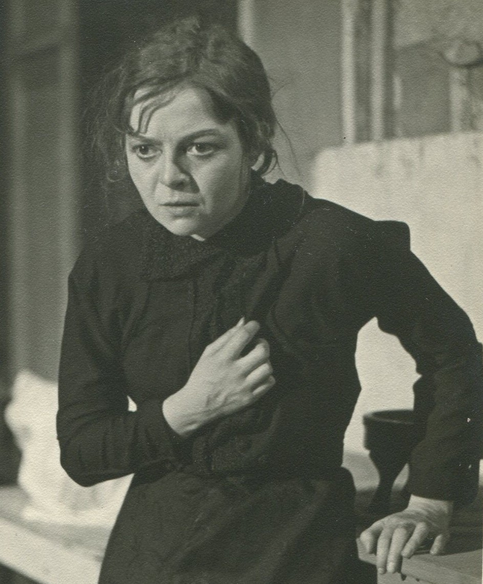 Lotte Berger als Selma Knobbe in "Die Ratten"